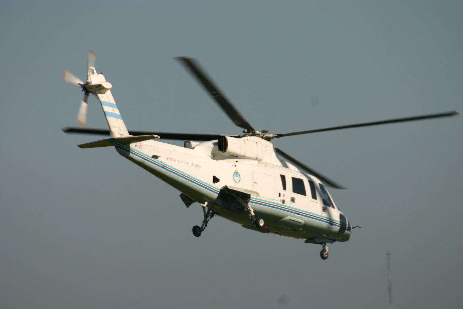 H-02 Sikorsky S-76 Republica Argentina